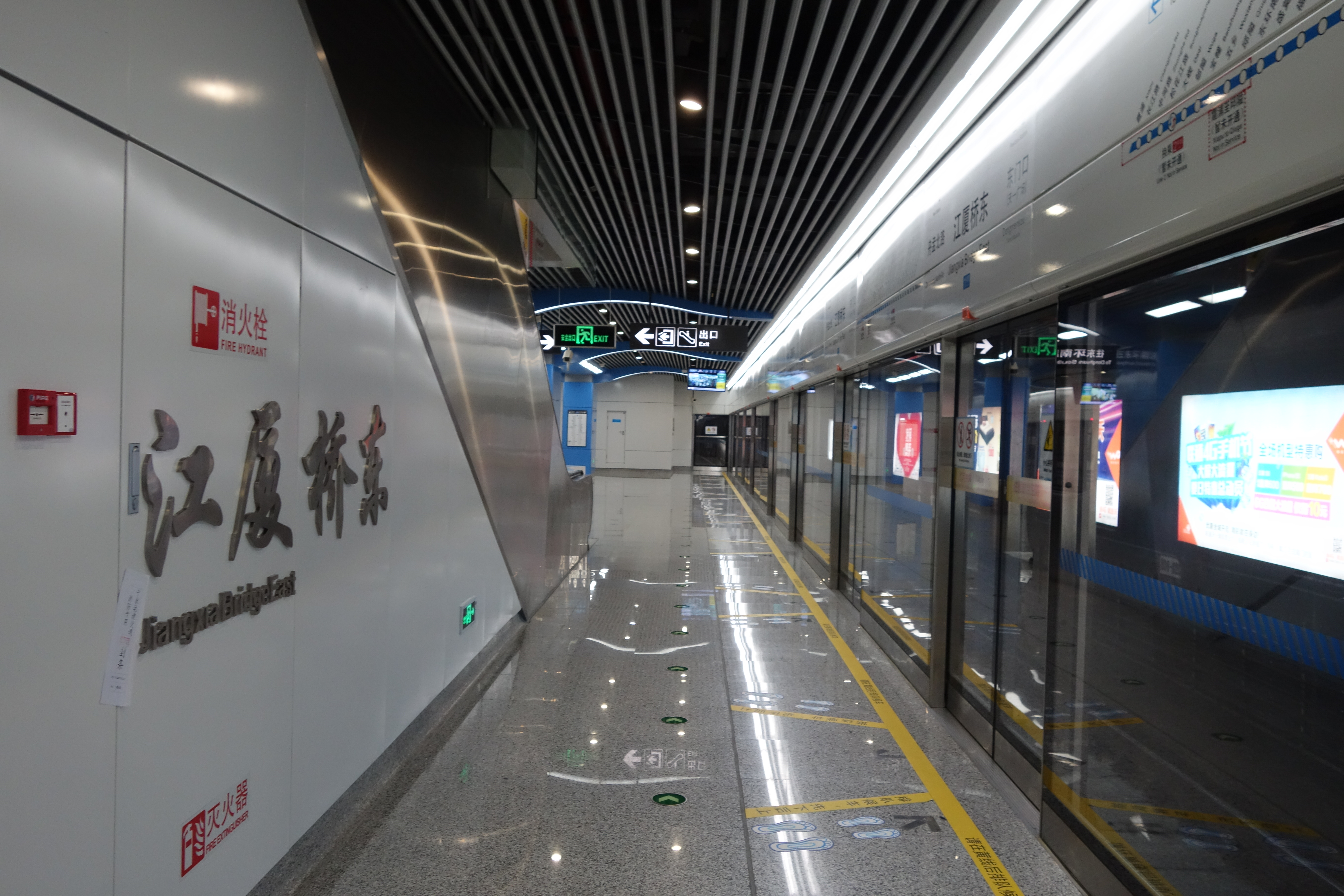 江厦桥东站站台